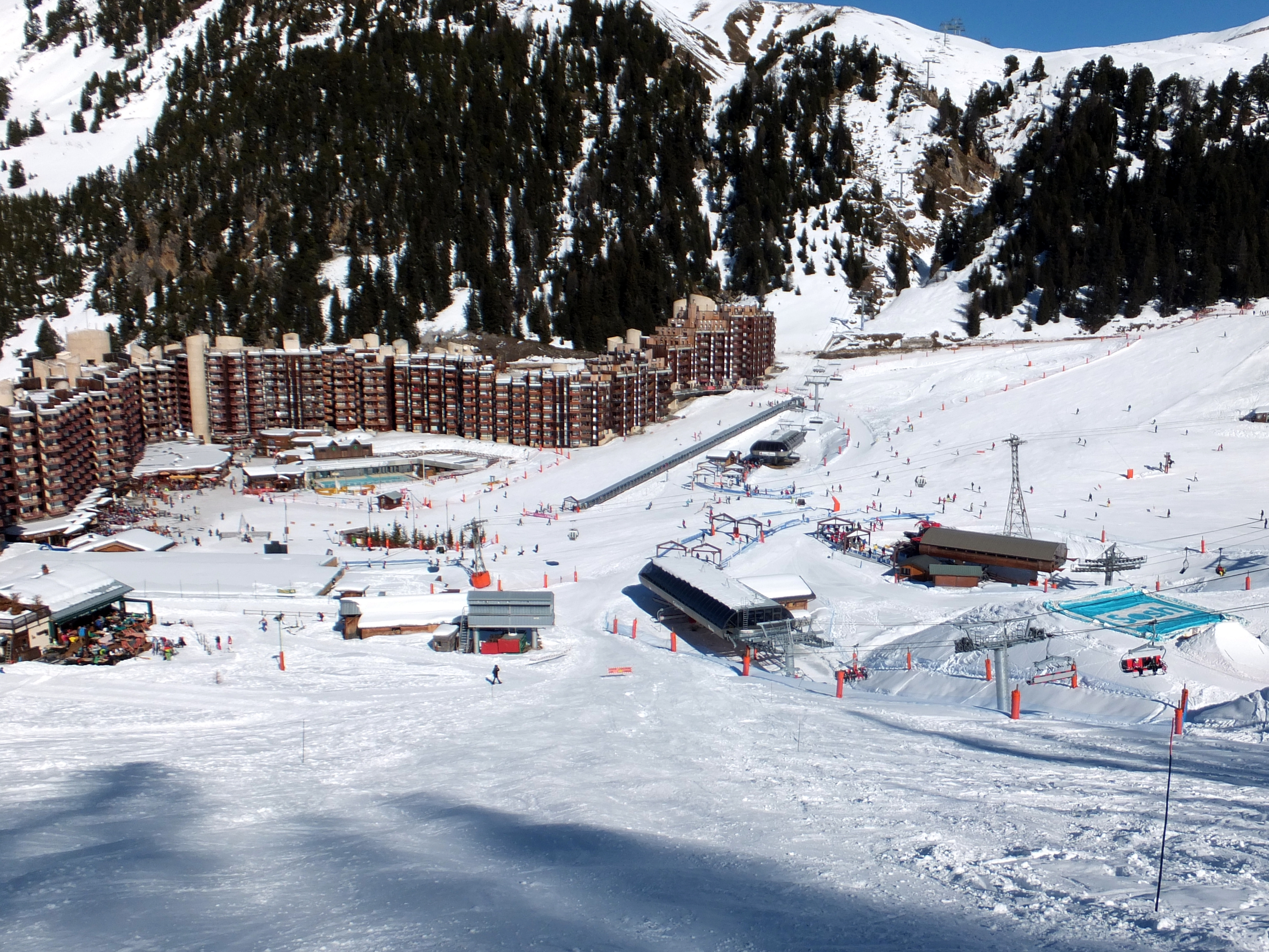 Plagne Bellecôte vu depuis la piste noire des Colosses